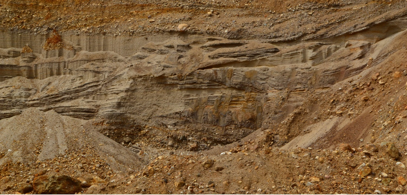 Lacustrine sands (Under Moscow, Lime Pit "Nikitsky")